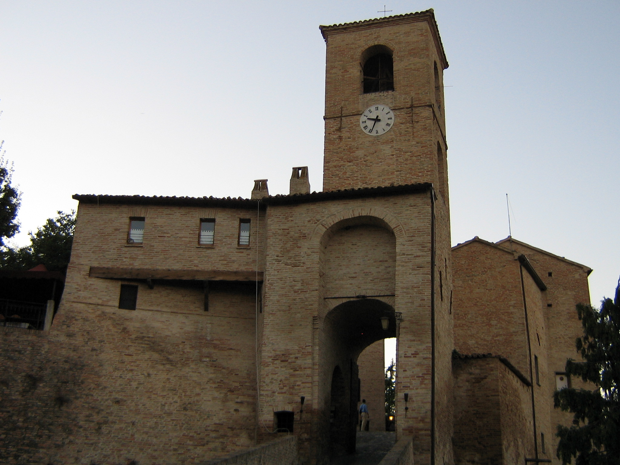 Montegridolfo: porta del cassero